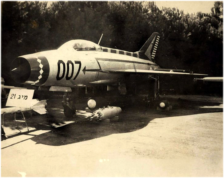 מטוס מיג 21 שהגיע לישראל באמצעות טייס שערק מעירק 1966